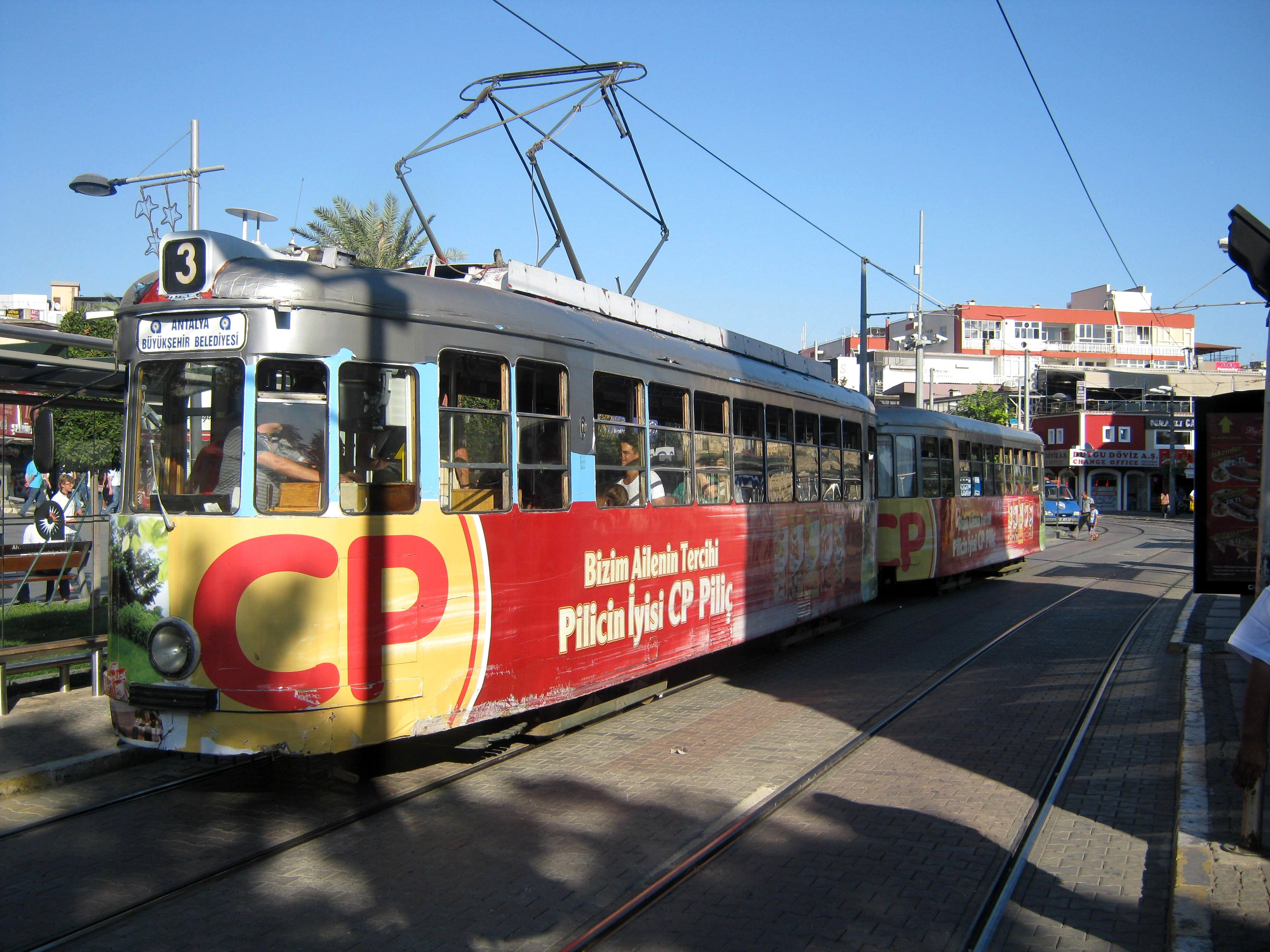 Трамвай в Анталье